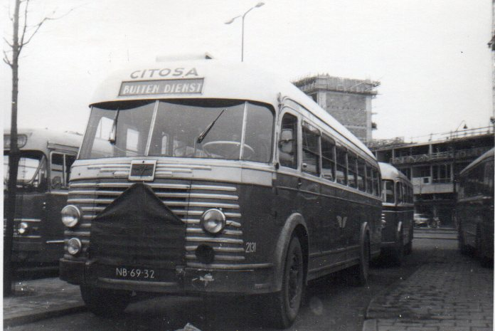 Crossley SD42/2, carrosserie Aviolanda, nummer 2131 van busbedrijf Citosa, omstreeks 1962. Stationsplein Leiden.